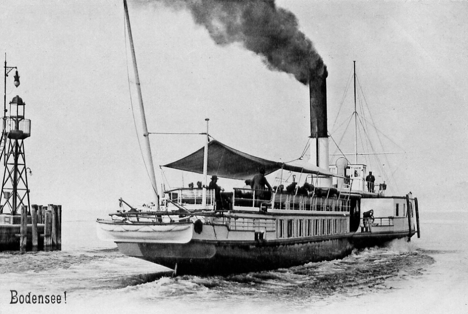 Als drittes Schweizer Schiff wird 1855 die Stadt Zürich dem Betrieb übergeben. Der Dampfer ist häufig in Kollisionen verwickelt und versenkt zudem die bayerischen Schiffe Ludwig und Jura. 1870 Umbenennung in Zürich I, 1883/84 Umbau in Halbsalonbauart, 1917/18 Abbruch in Romanshorn.